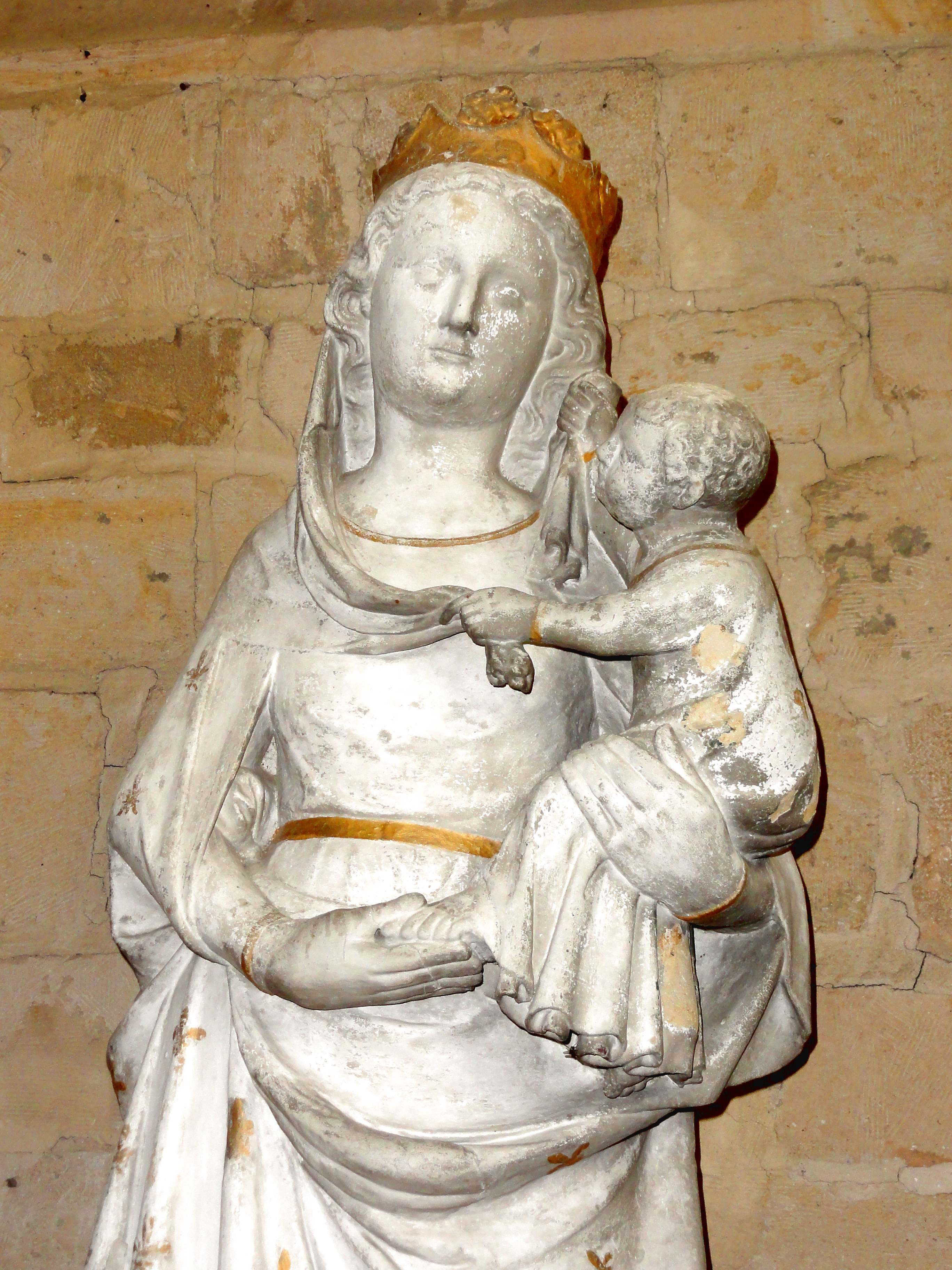 Vierge à l'Enfant du second quart du XIVe siècle.